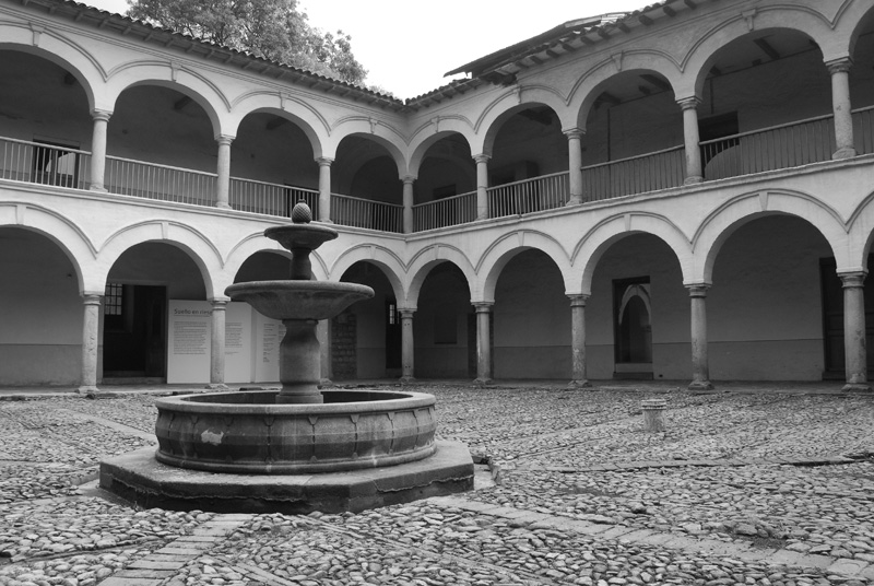 Patio interior del Claustro de San Agustín (Bogotá, Colombia)